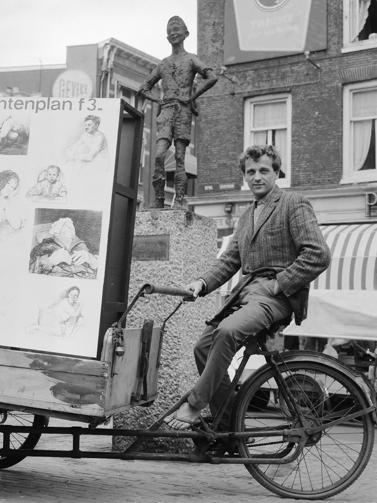 Jasper Grootveld met tekeningen van Veldhoen op bakfiets door de stad, wachtend op klanten 6 juli 1964